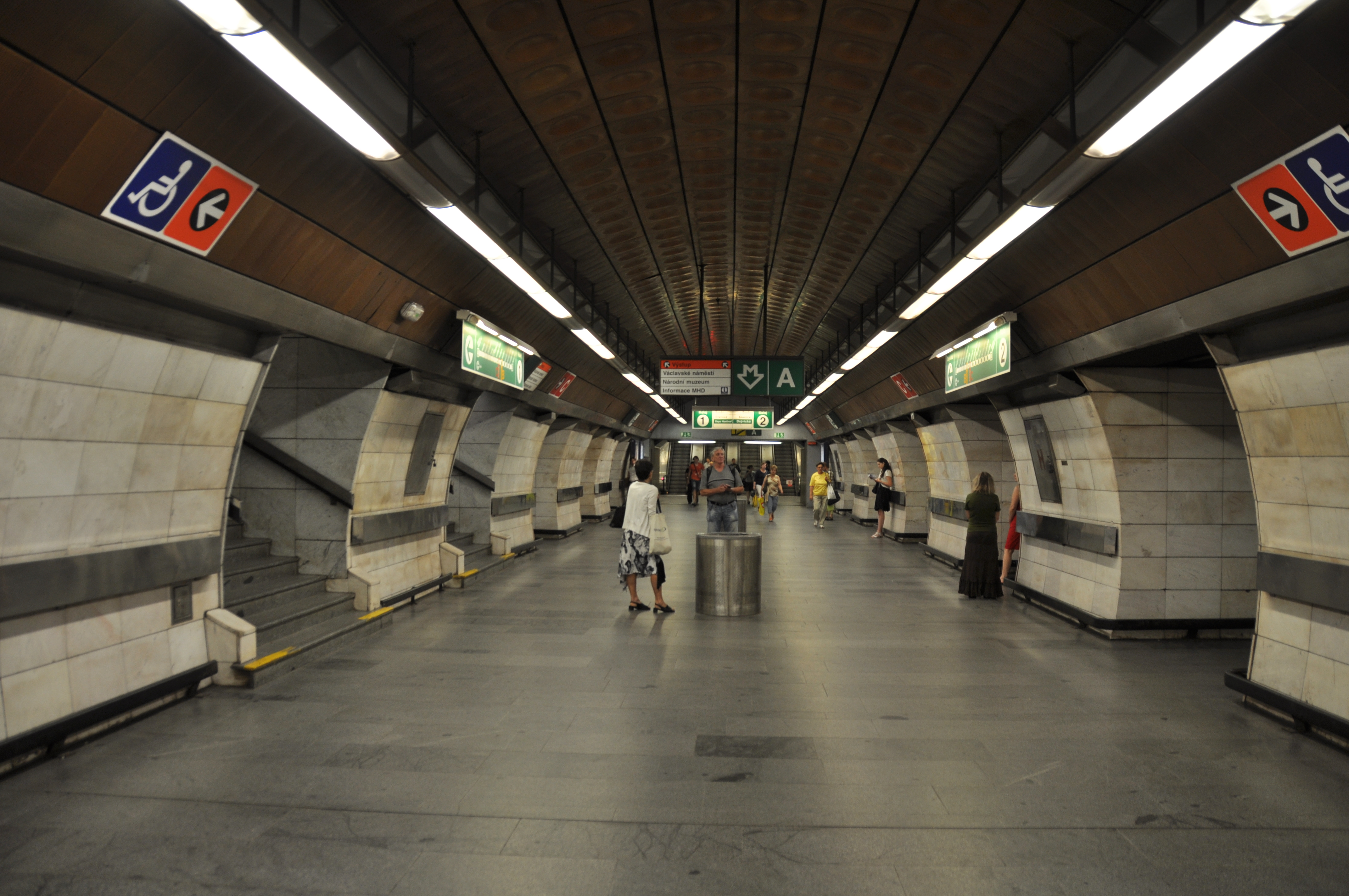 Metro Praha